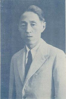 铁展 1934-2 道清路 局长 范子遂